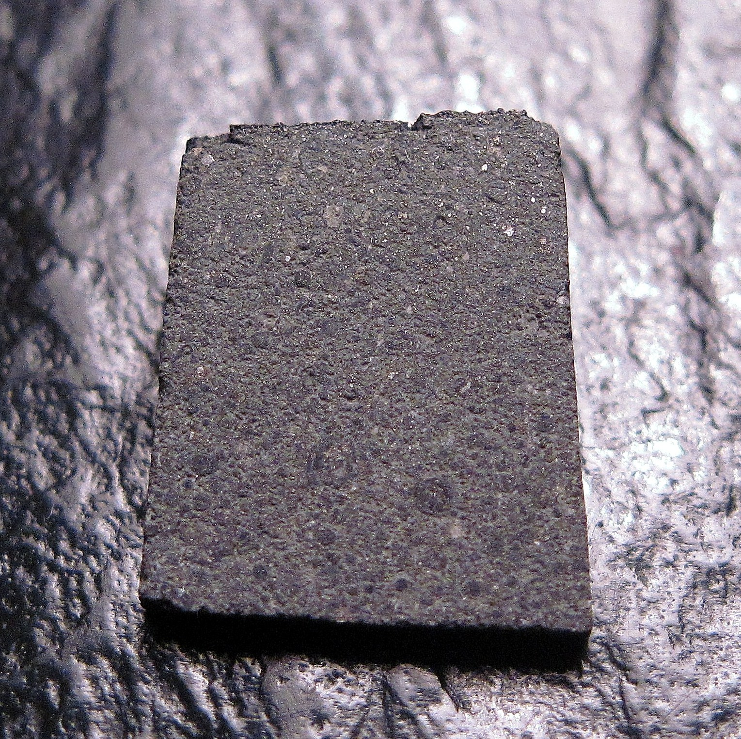 Moss meteorite slice